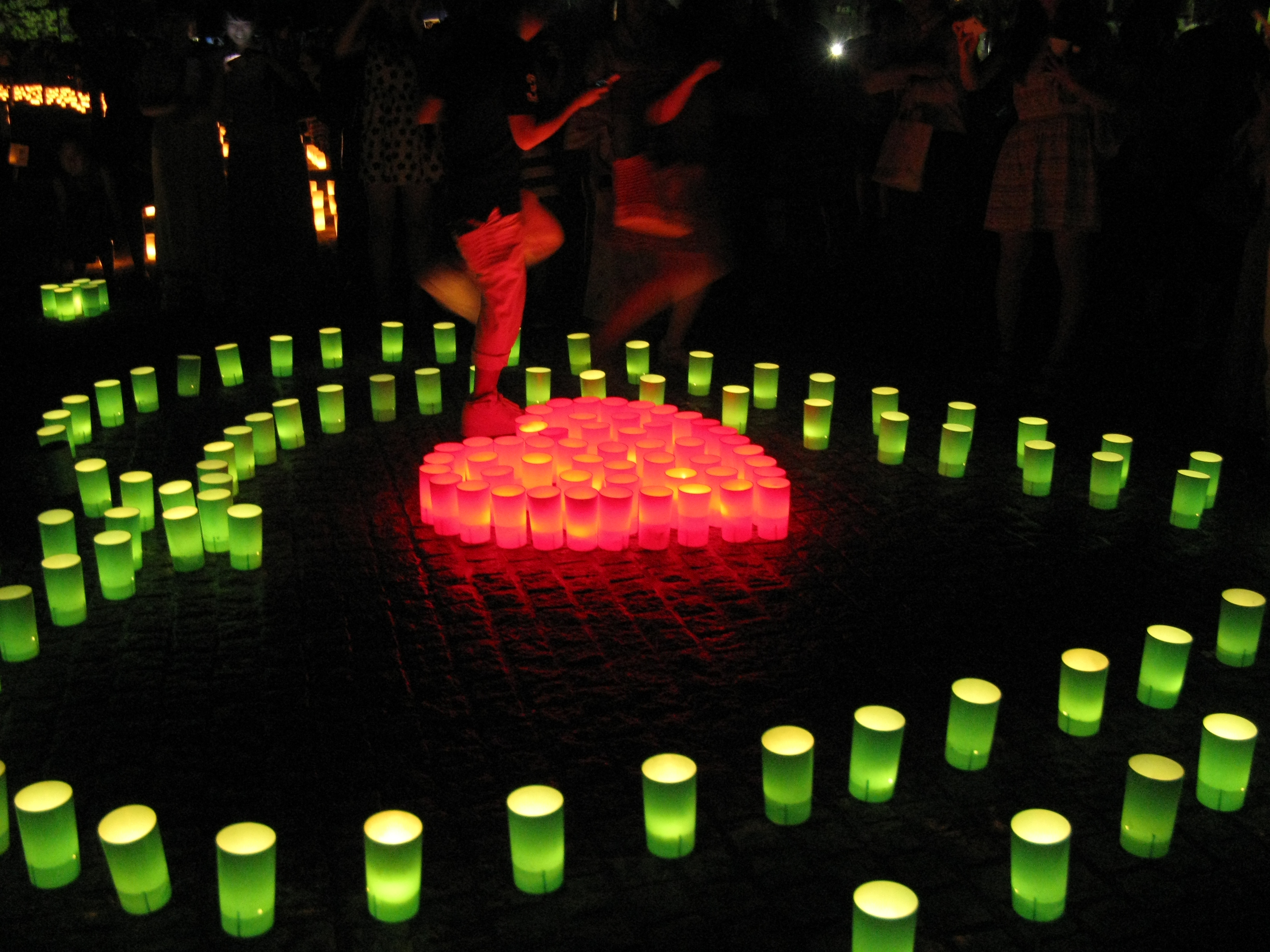 2013年の「なら燈花会」（奈良国立博物館前にて）